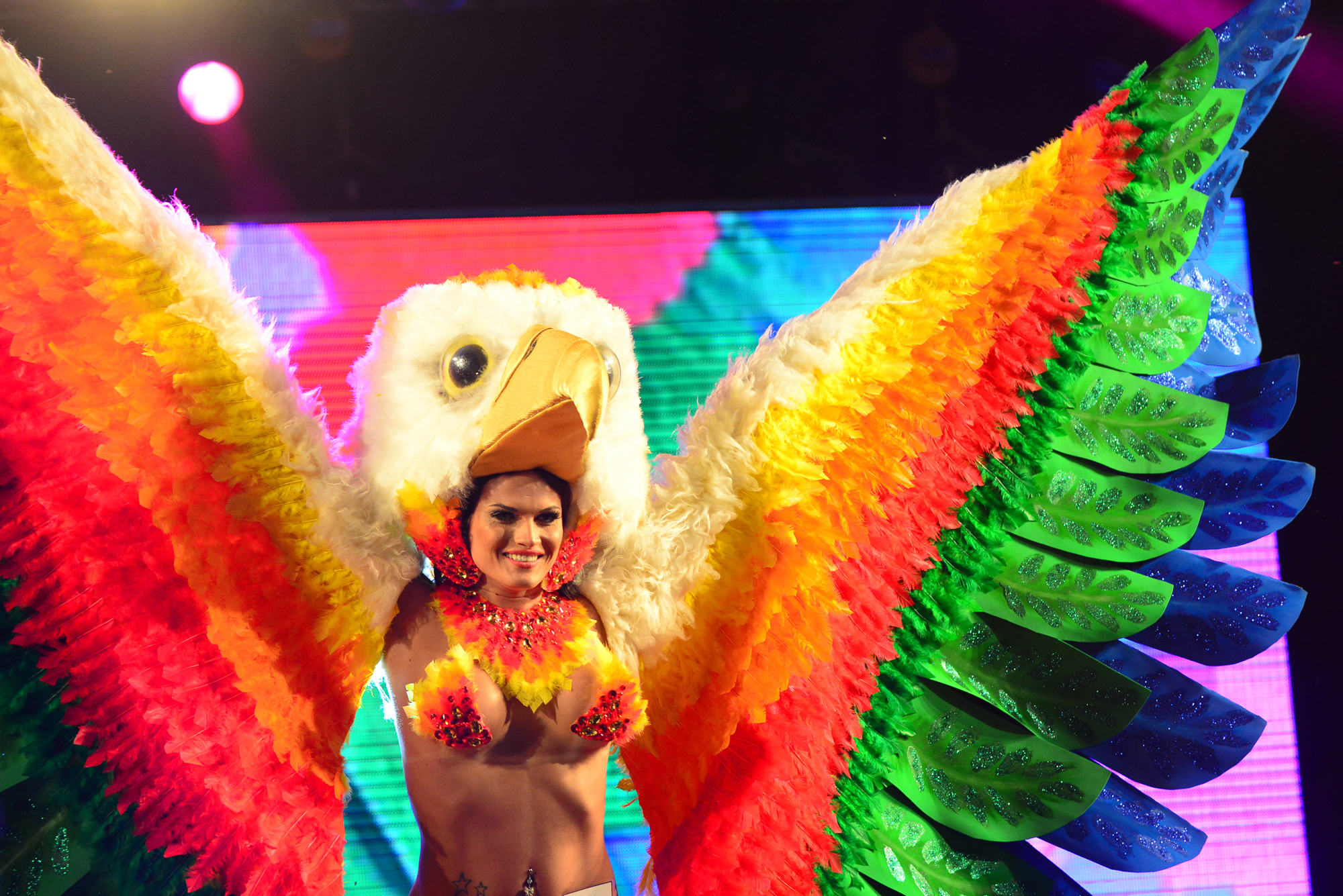 Concurso Pop Gay no Carnaval de 2014 de Florianópolis.